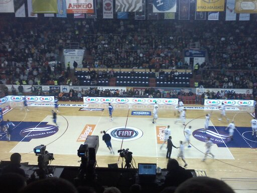 Početak meča 23. kola Jadranske lige između Radničkog i Budućnosti u Kragujevcu